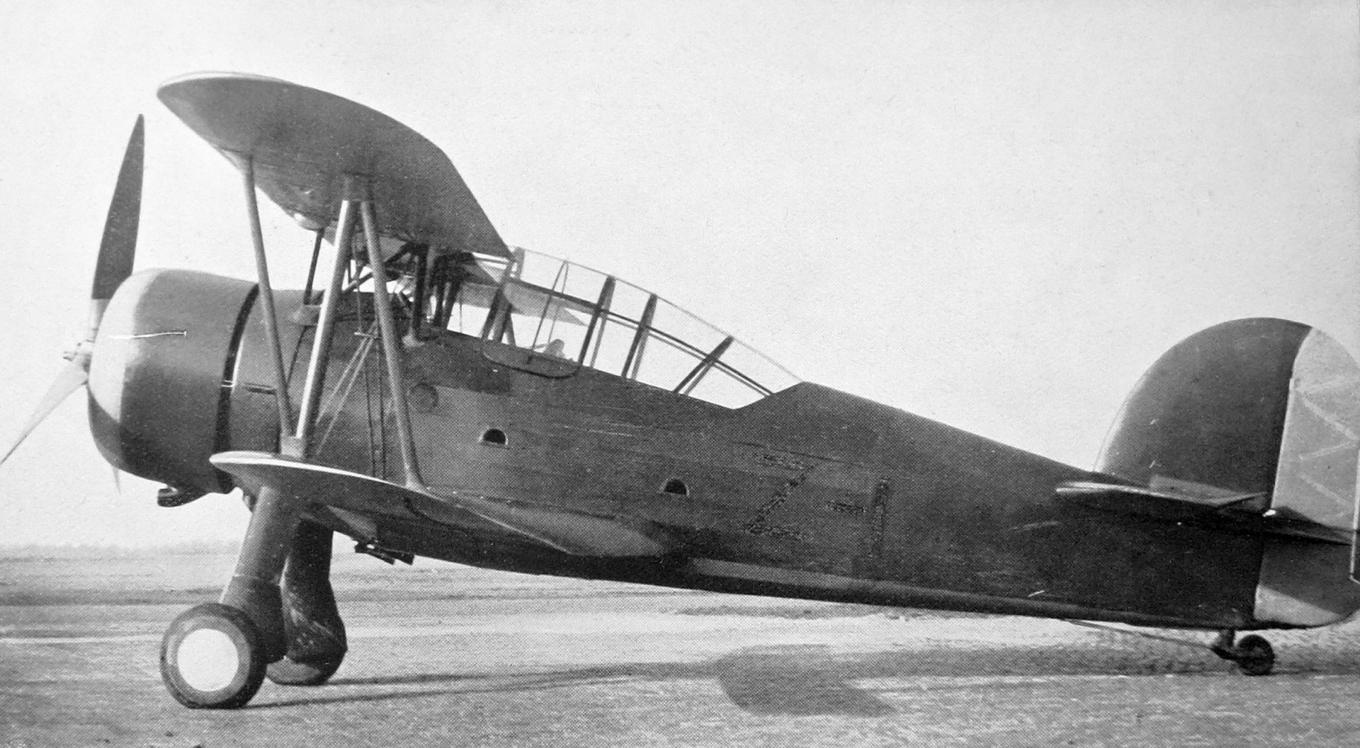 Koolhoven F.K. 52 a Walter Pegas X